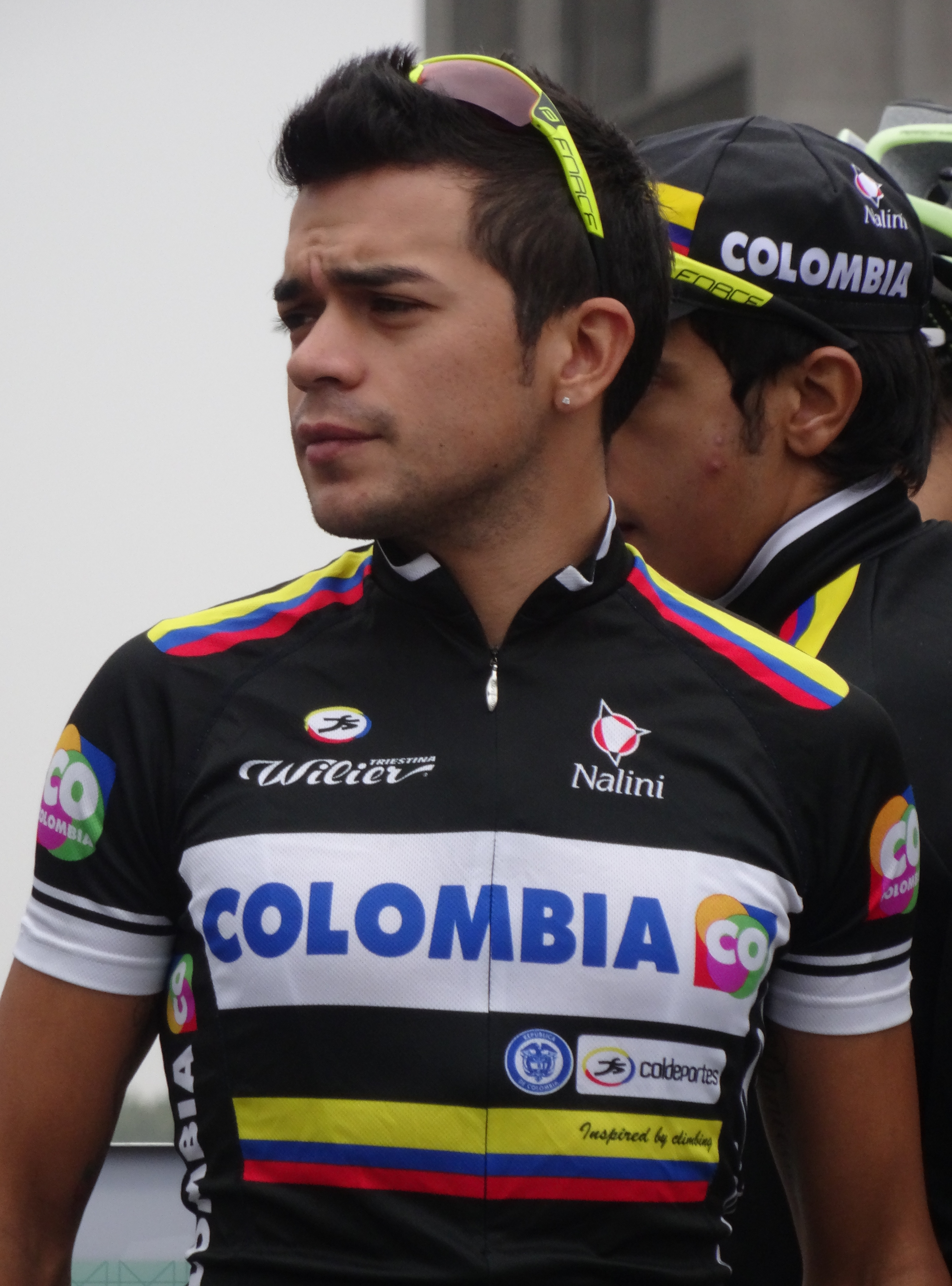 Brussels Cycling Classic 2014.